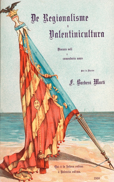 Portada de "De regionalisme i valentinicultura", text de Faustí Barberà.